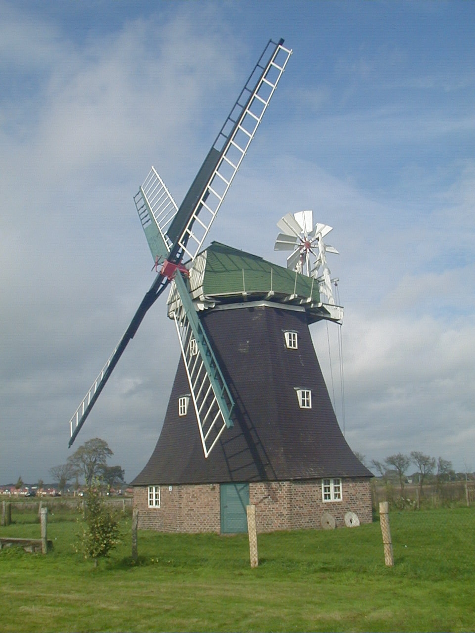 Windmill Erdhollaender Rövershagen, Landkreis Bad Doberan, Germany